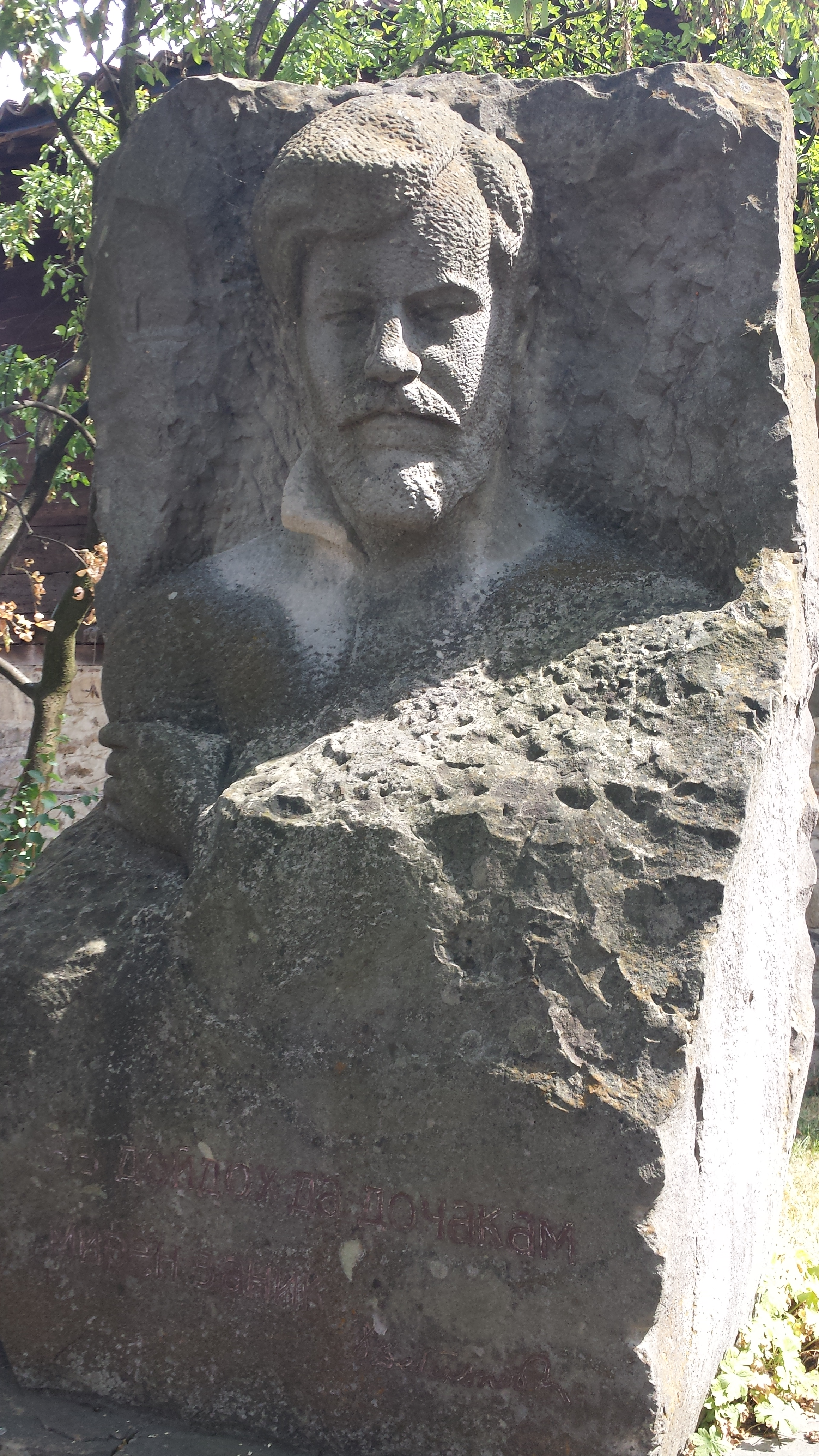 В Копривщица